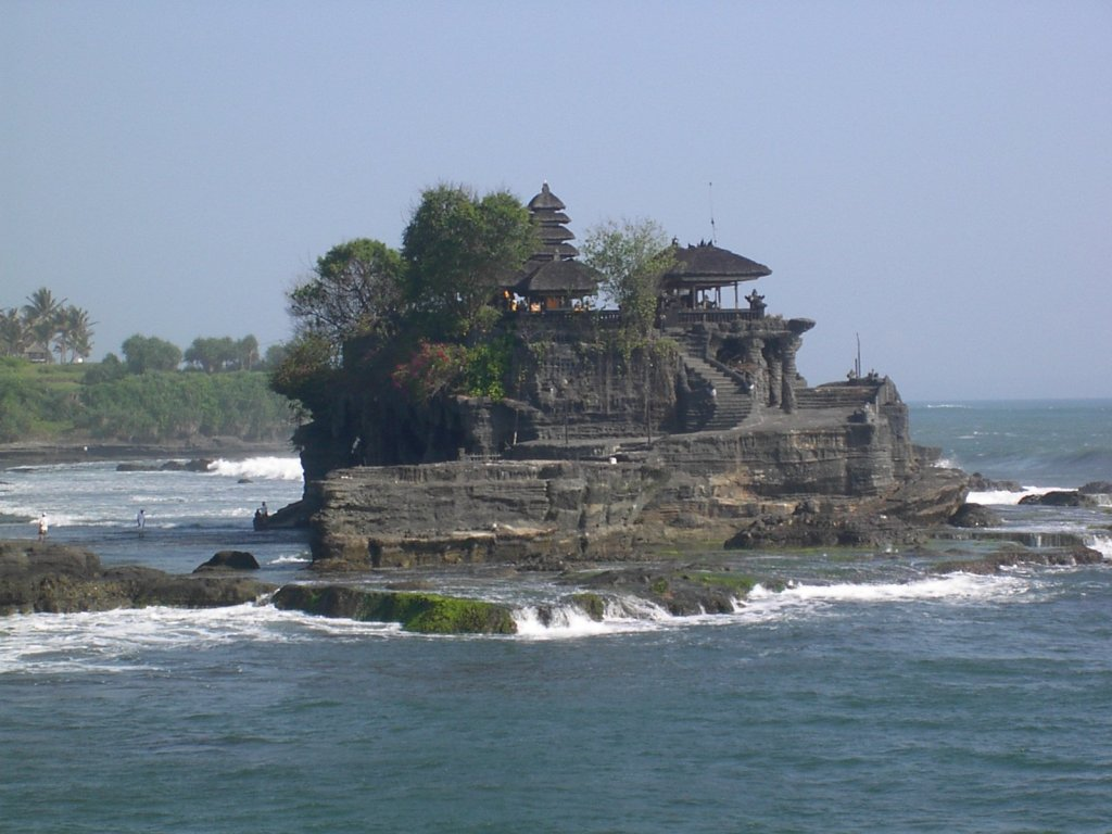 Pura Tanah Lot - auf deutsch häufig "Meerestempel" genannt - ist ein Tempel an der Küste im Südwesten der indonesischen Insel Bali.